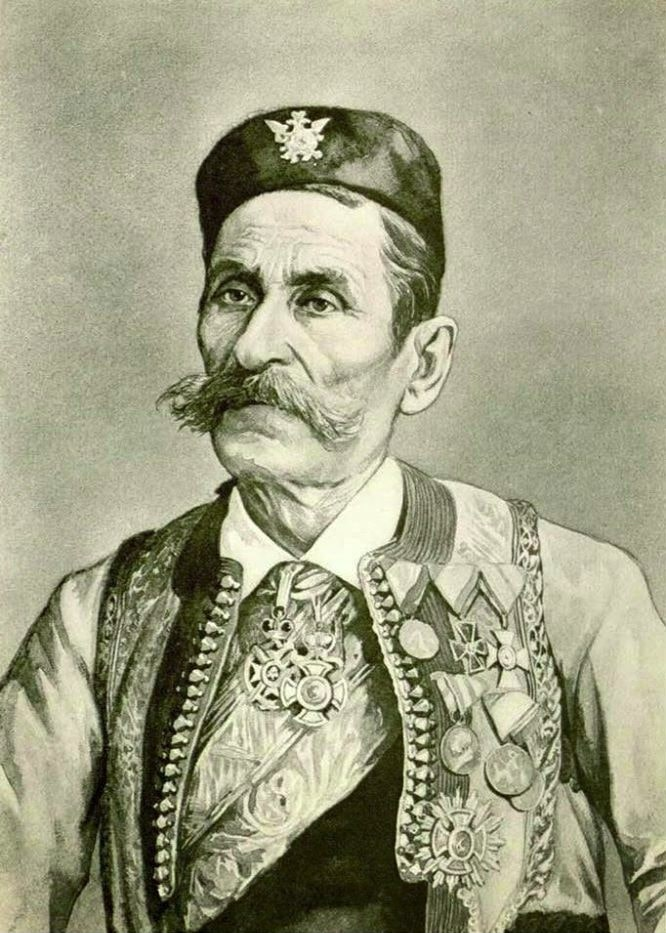 Йоле Пилетич